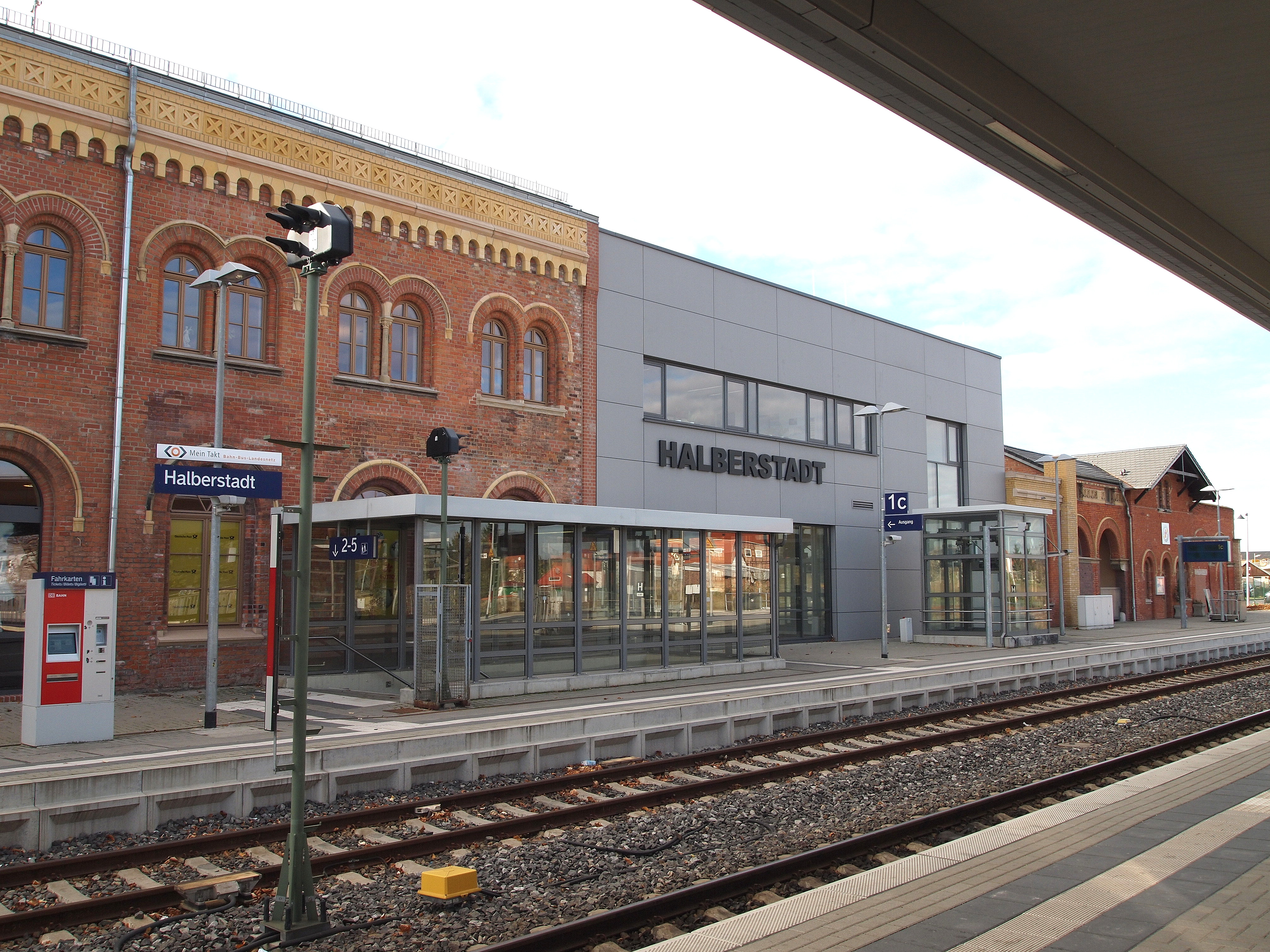 Halberstadt (Landkreis Harz, Sachsen-Anhalt) Hauptbahnhof, Blick von Gleis 3